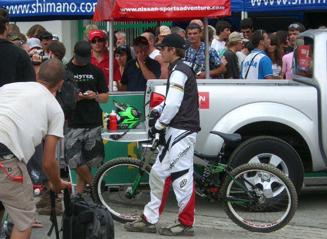 Sam Hill beim Downhill Worldcup in Schladming 2007